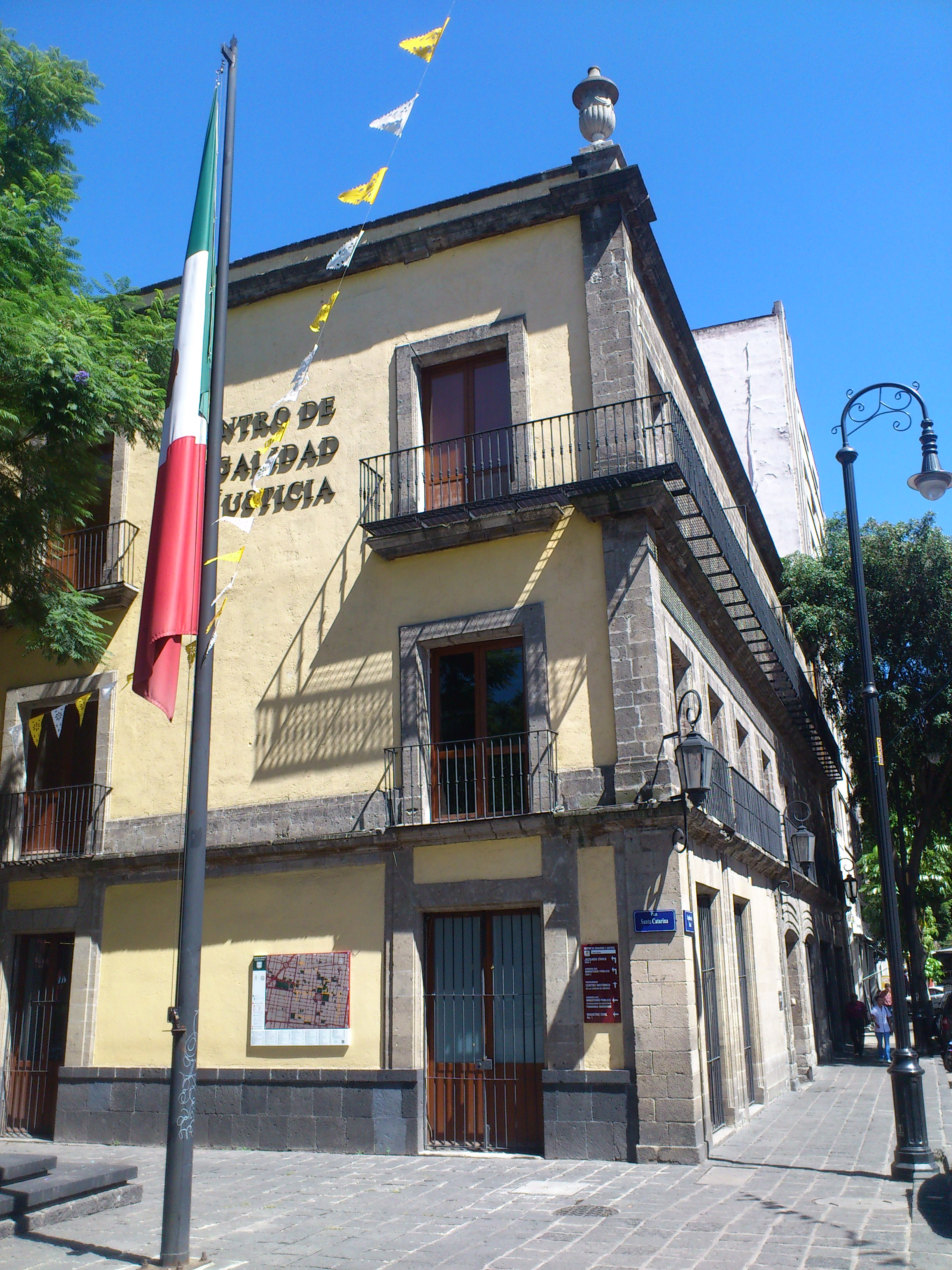 Casa Tagle en el barrio de la Lagunilla